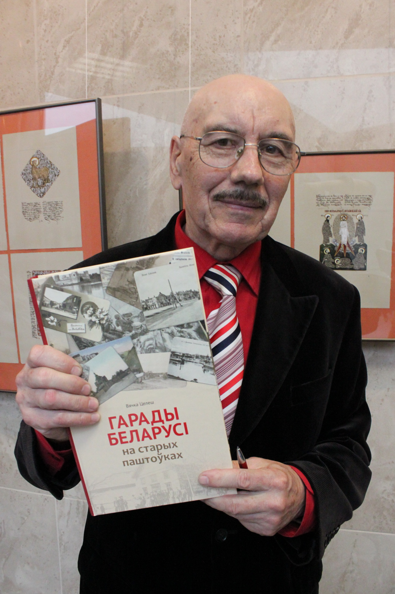 Вячко Телеш, белорусский художник, историк и писатель